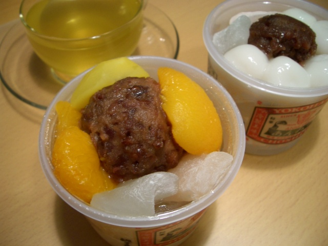 たっぷりの蜜が付いて一つ300円。けっこうなボリュームがある。